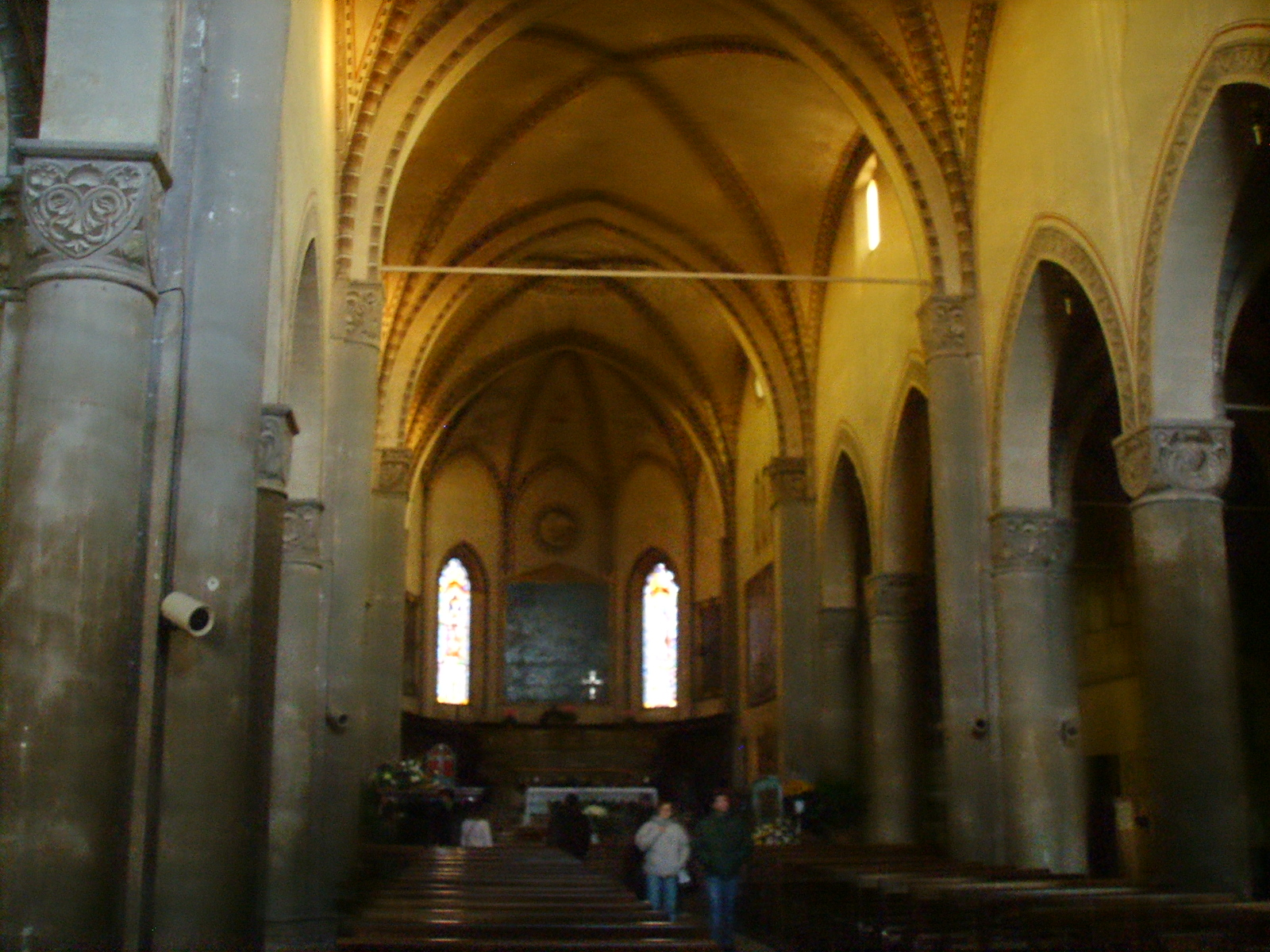 Zibello chiesa